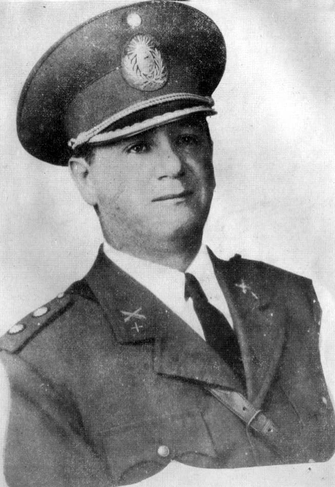 Tomás A. Ducó. Argentina